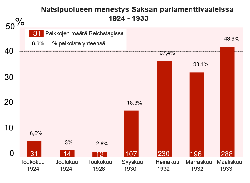 Natsien menestys parlamenttivaaleissa 1924-1933